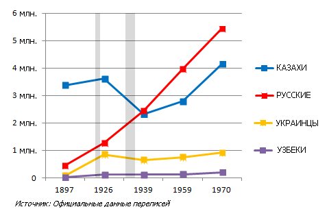 Национальный состав Казахстана в 1897-1970г. Наиболее крупные этносы. Серым размечены периоды голодов 1920-х и 1930-х годов.